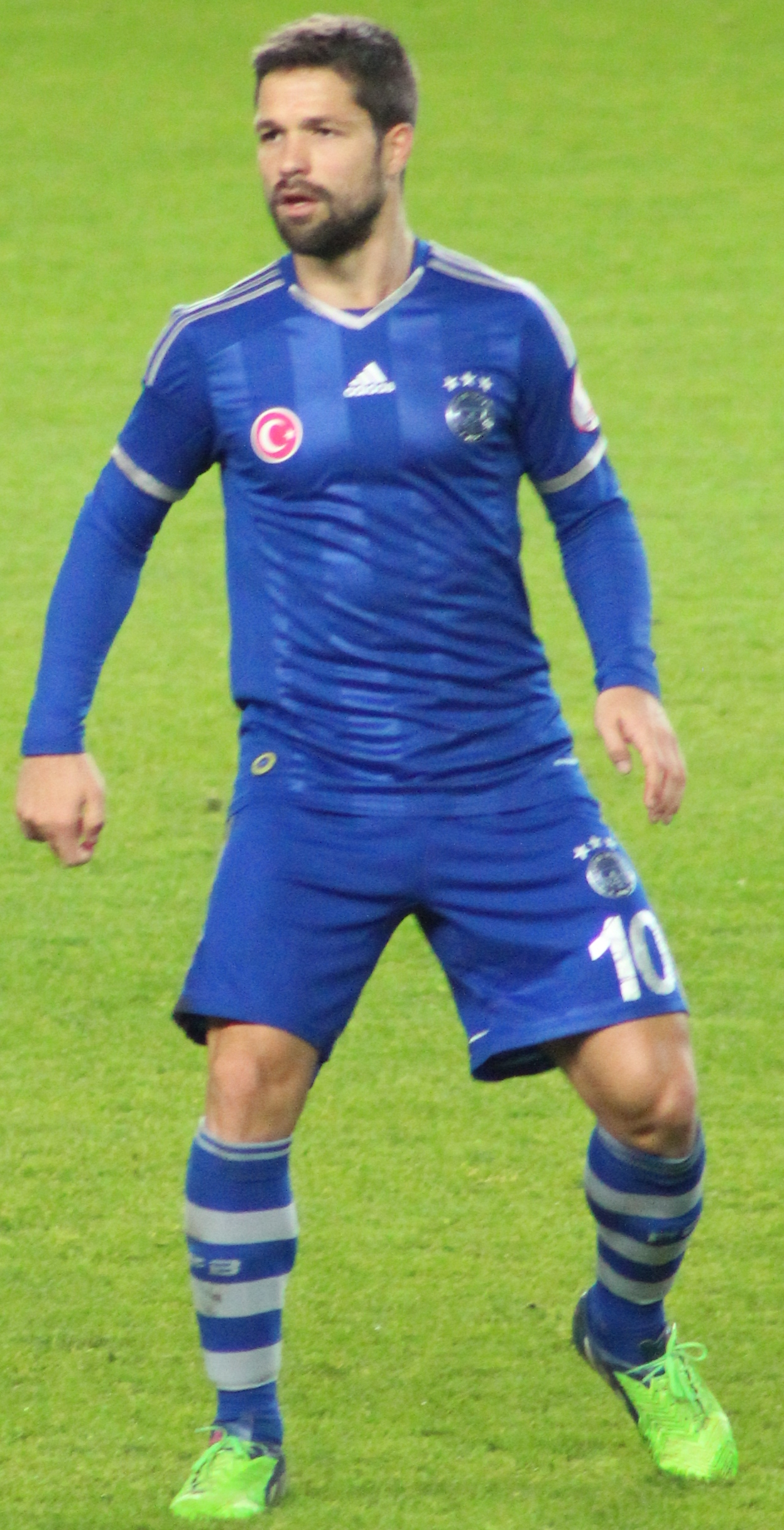 Diego Ribas @ Fenerbahce - Altinordu 23 December 2014